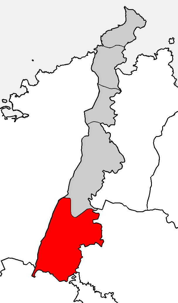 Situación da parroquia das Grañas do Sor no concello de Mañón